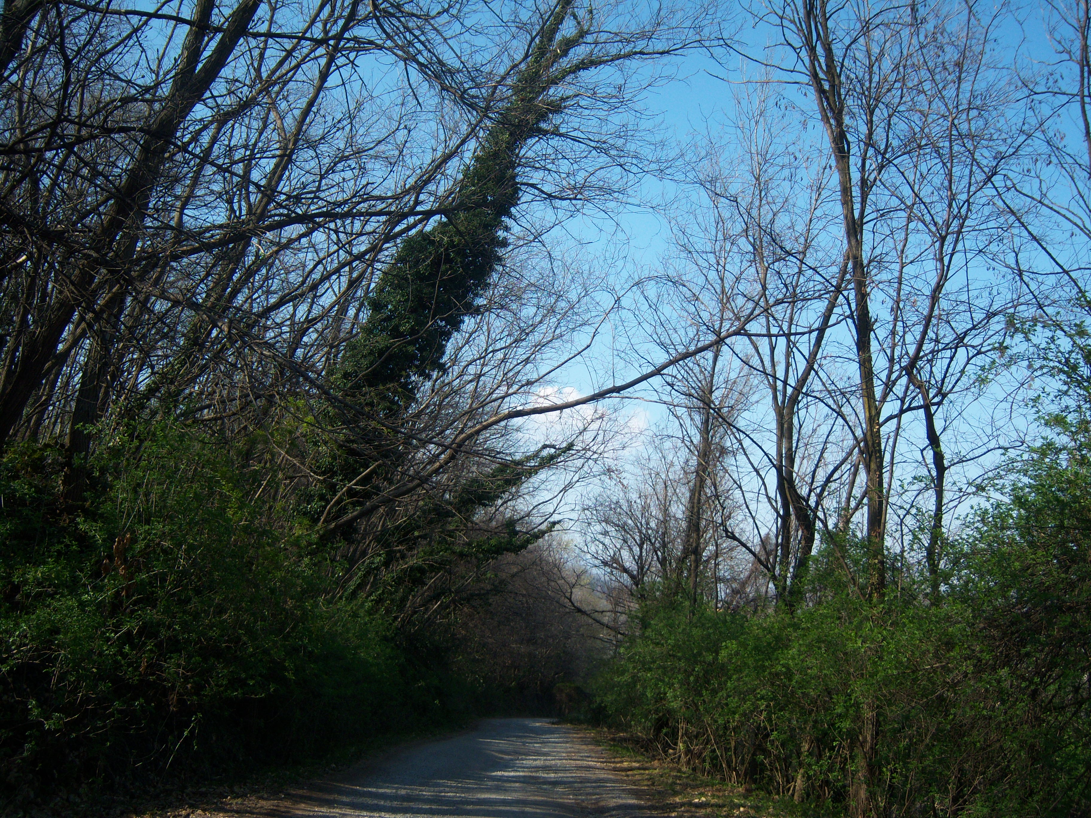 Strada della Val Curone